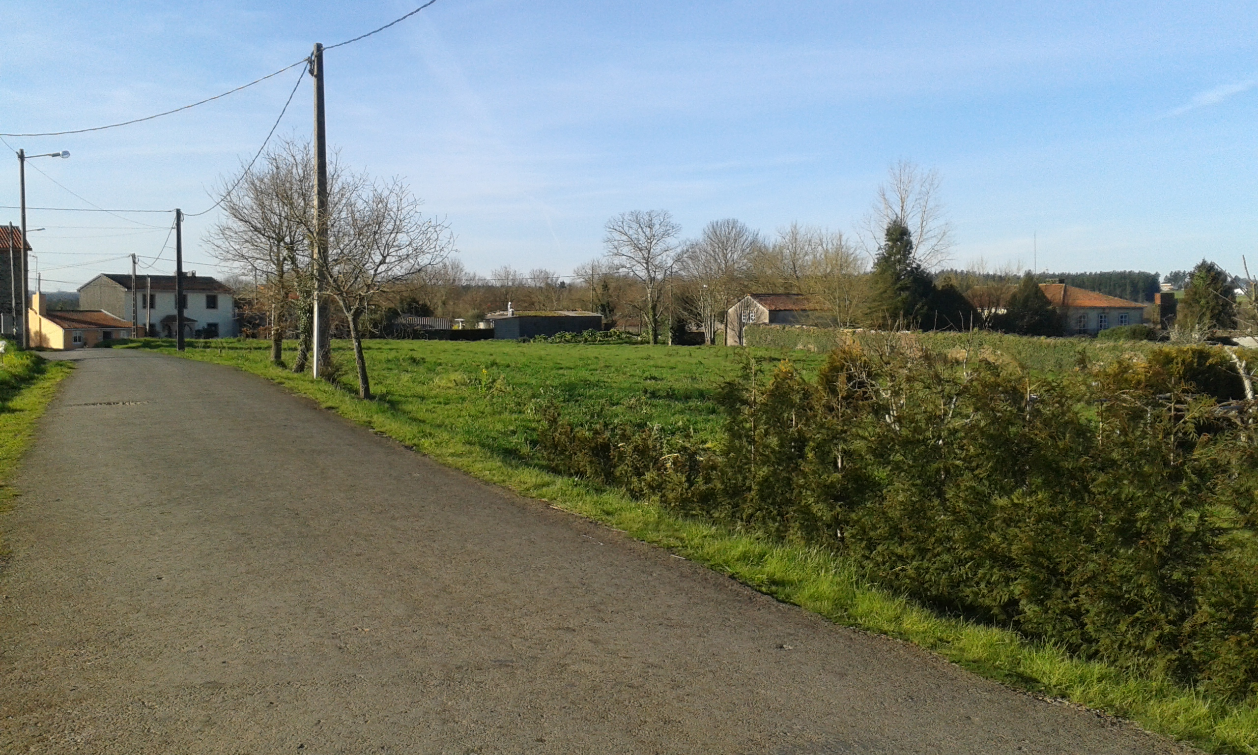 O Valado